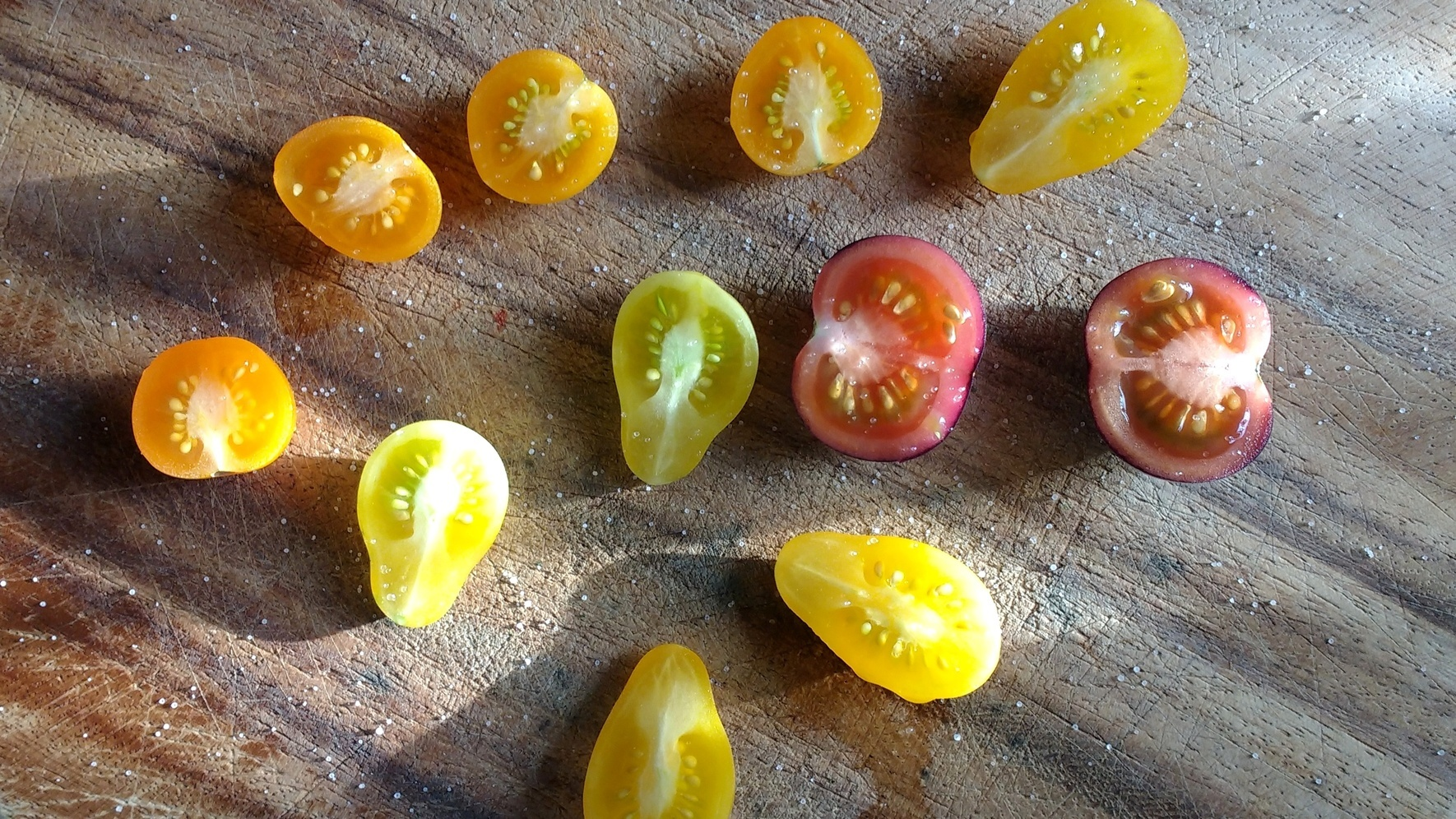 Drei Sorten Tomaten: gelbe Kirschtomate, Gelbe Dattelwein und Glossy rose blue - mit Salz